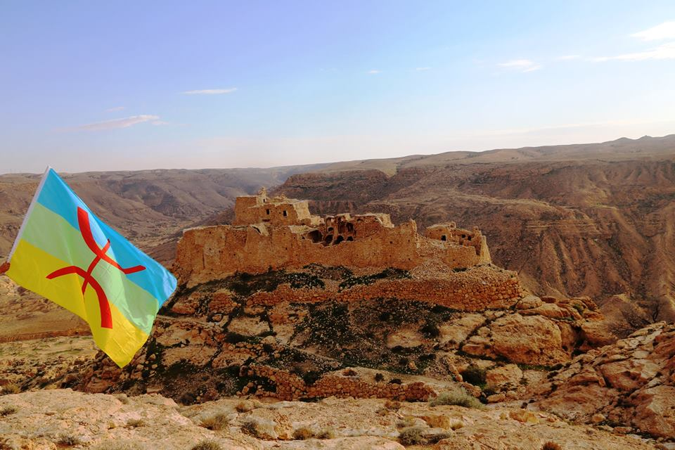 حسام الدين جونطو